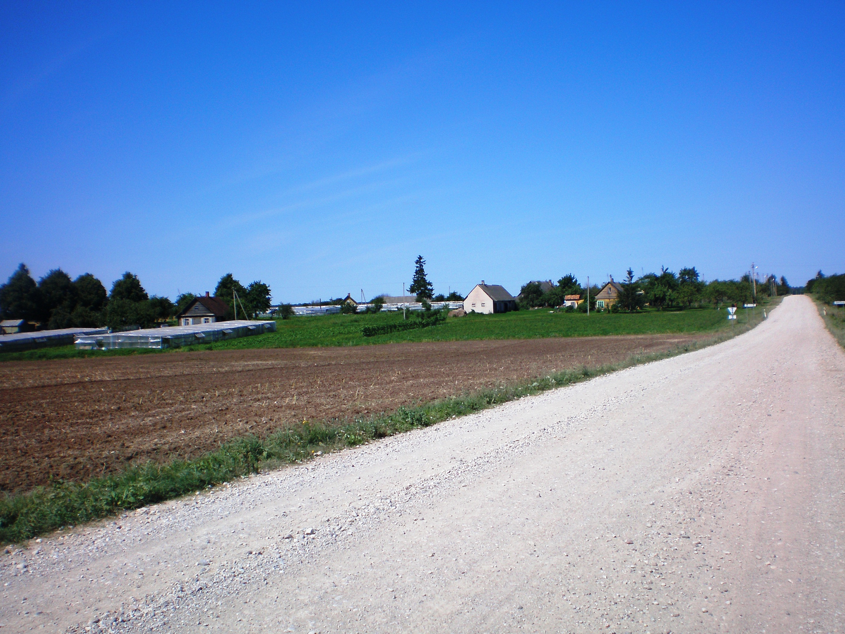 Berželė village, Lithuania